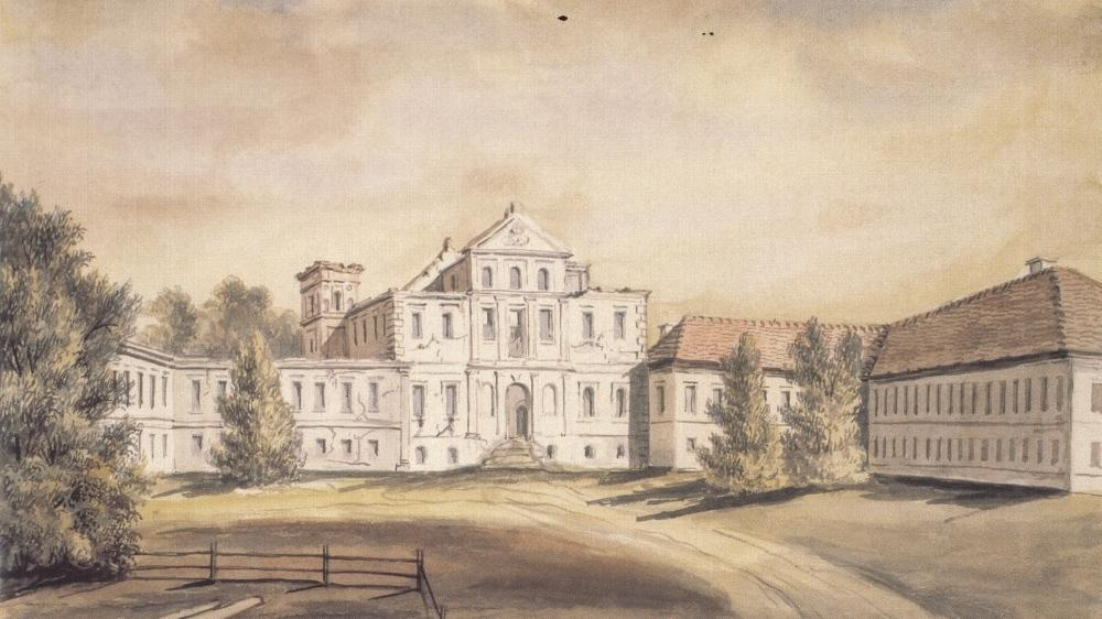 Jiezno dvaro (Pacų) rūmai